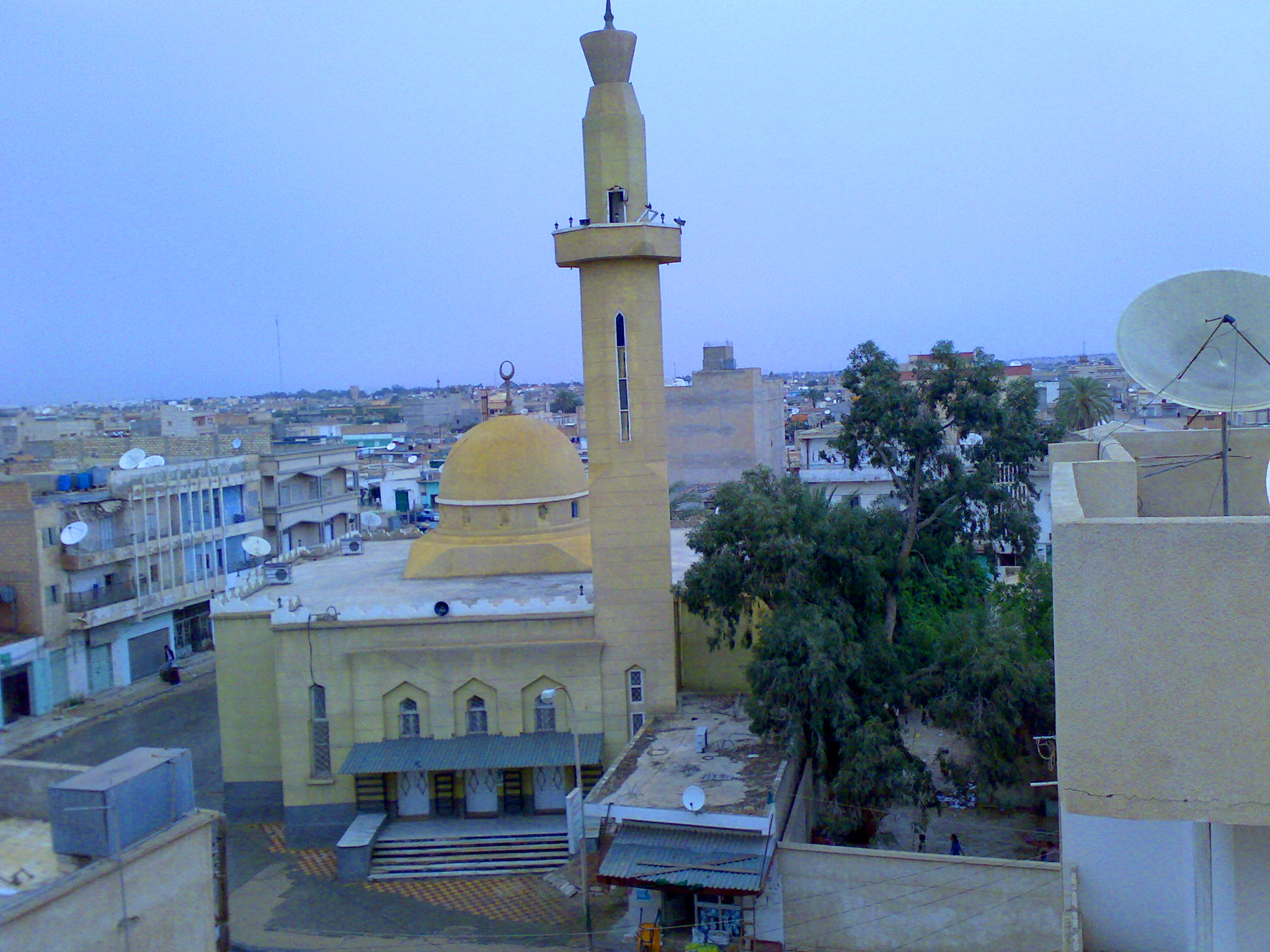 Ajdabiya, Libya